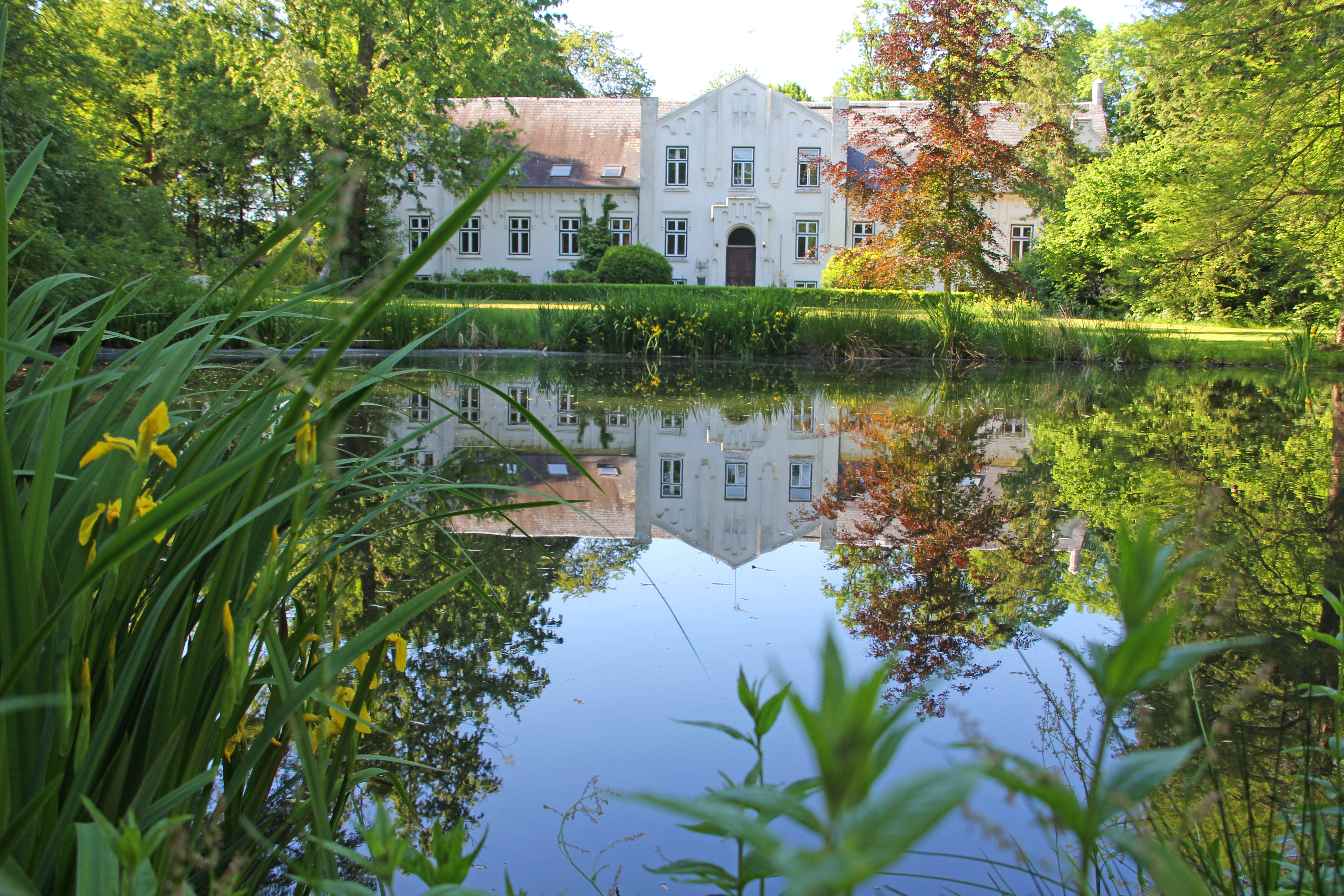 Das neugotische Herrenhaus und der Gutspark gehören heute der Zen Vereinigung Deutschland. Seine heutige Gestalt erhielt das Haus 1870.